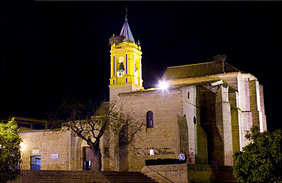 Parroquia de S. Jorge Mártir, de Palos de la Frontera (Huelva) © Miguel Ángel "fotógrafo" Citar siempre al autor.